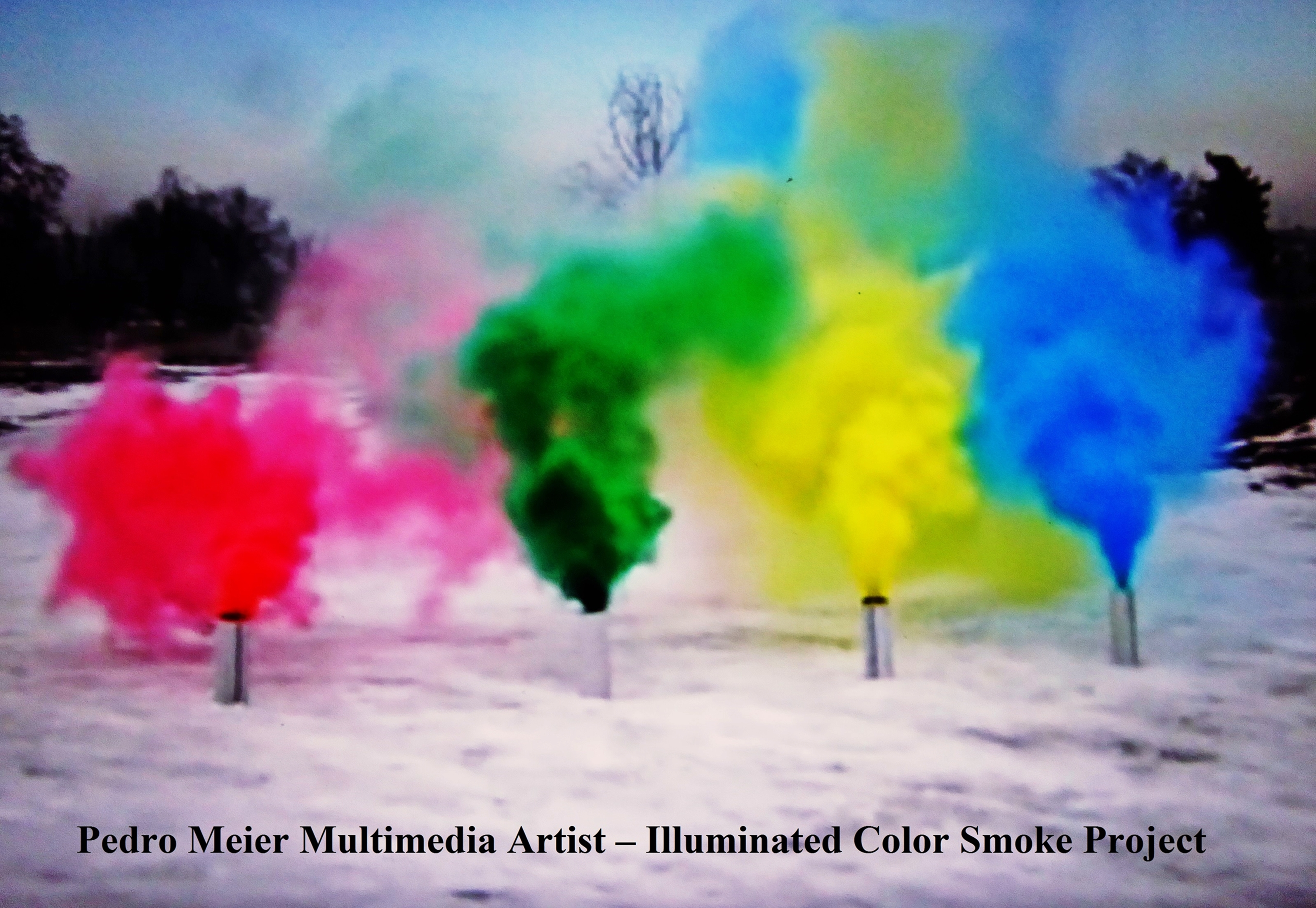 Rauch Performance von Pedro Meier Multimedia Artist, Art of Color Smoke Bombs Installation by Pedro Meier, Land Art